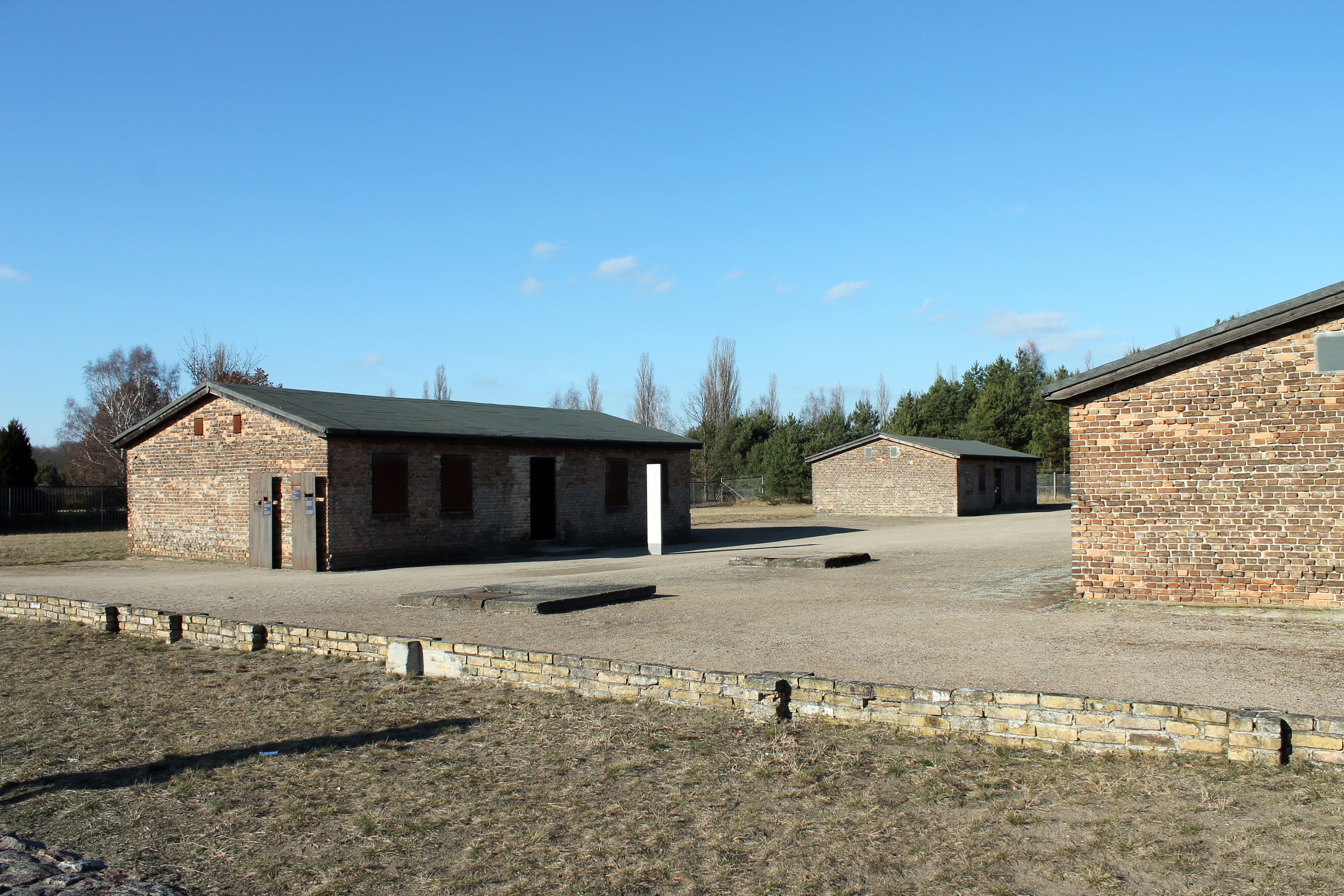 Speziallager im KZ Sachsenhausen